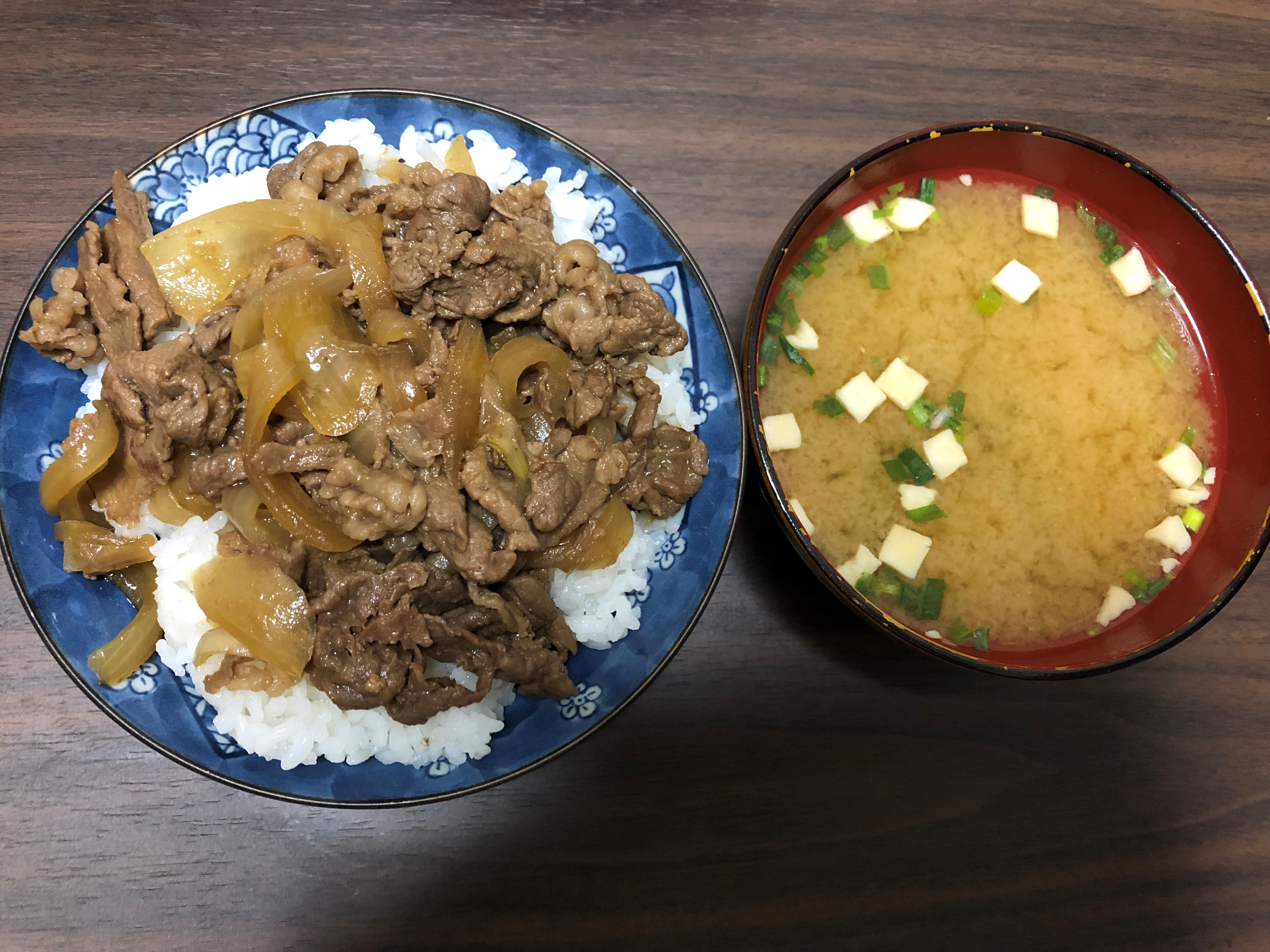 家庭で調理された牛丼と味噌汁